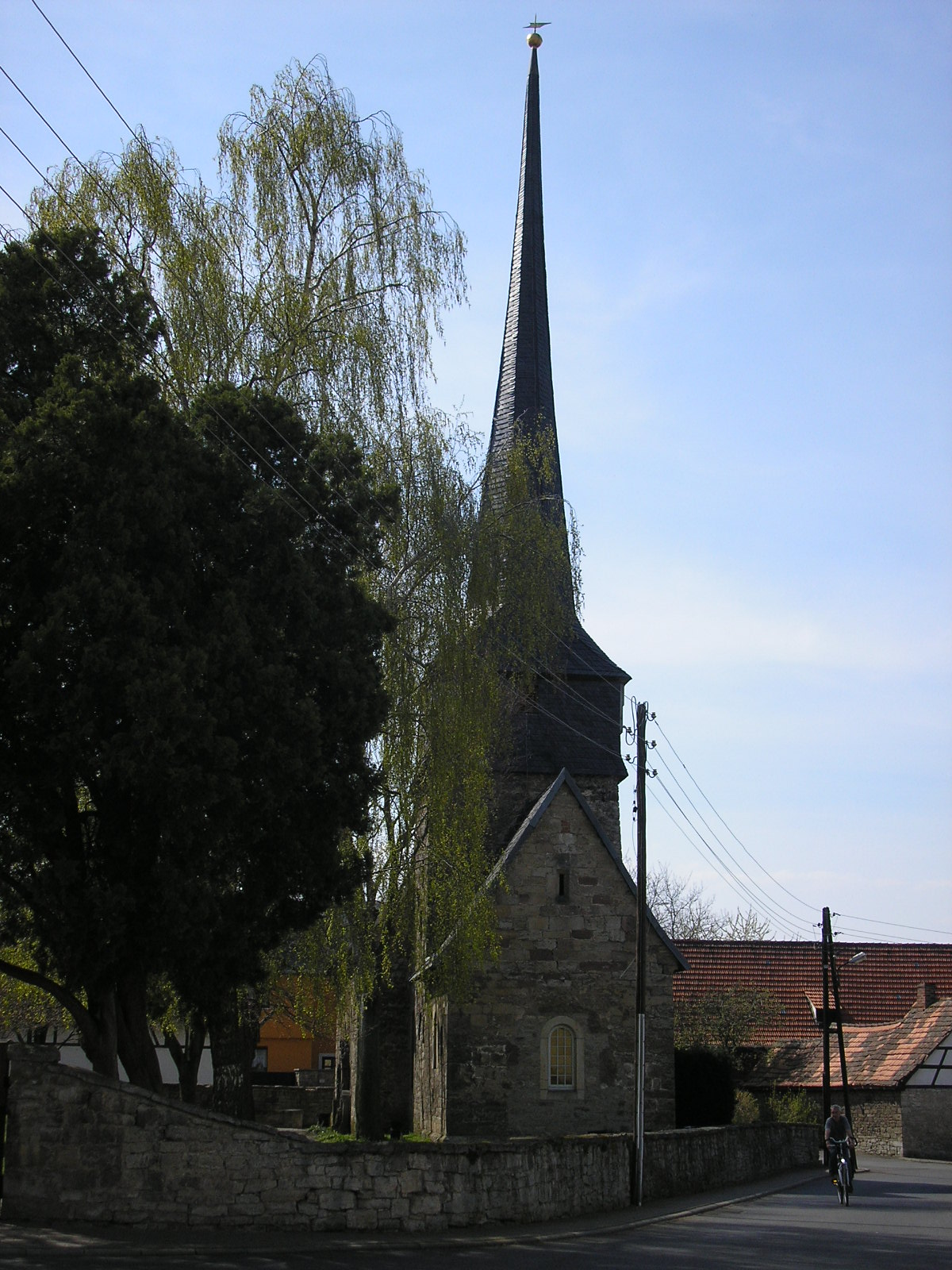 Die Kirche von Gelmeroda (Thüringen).